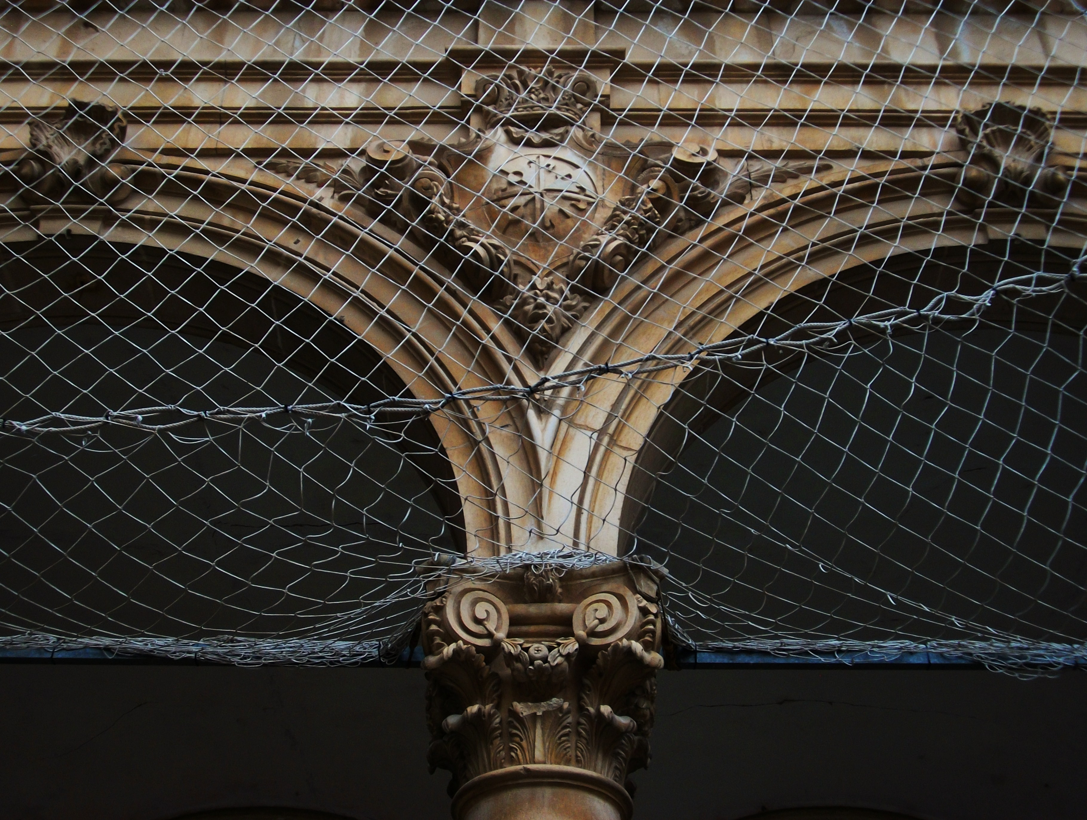 Detall del claustre de la Universitat del Col·legi de sant Doménec d'Oriola.